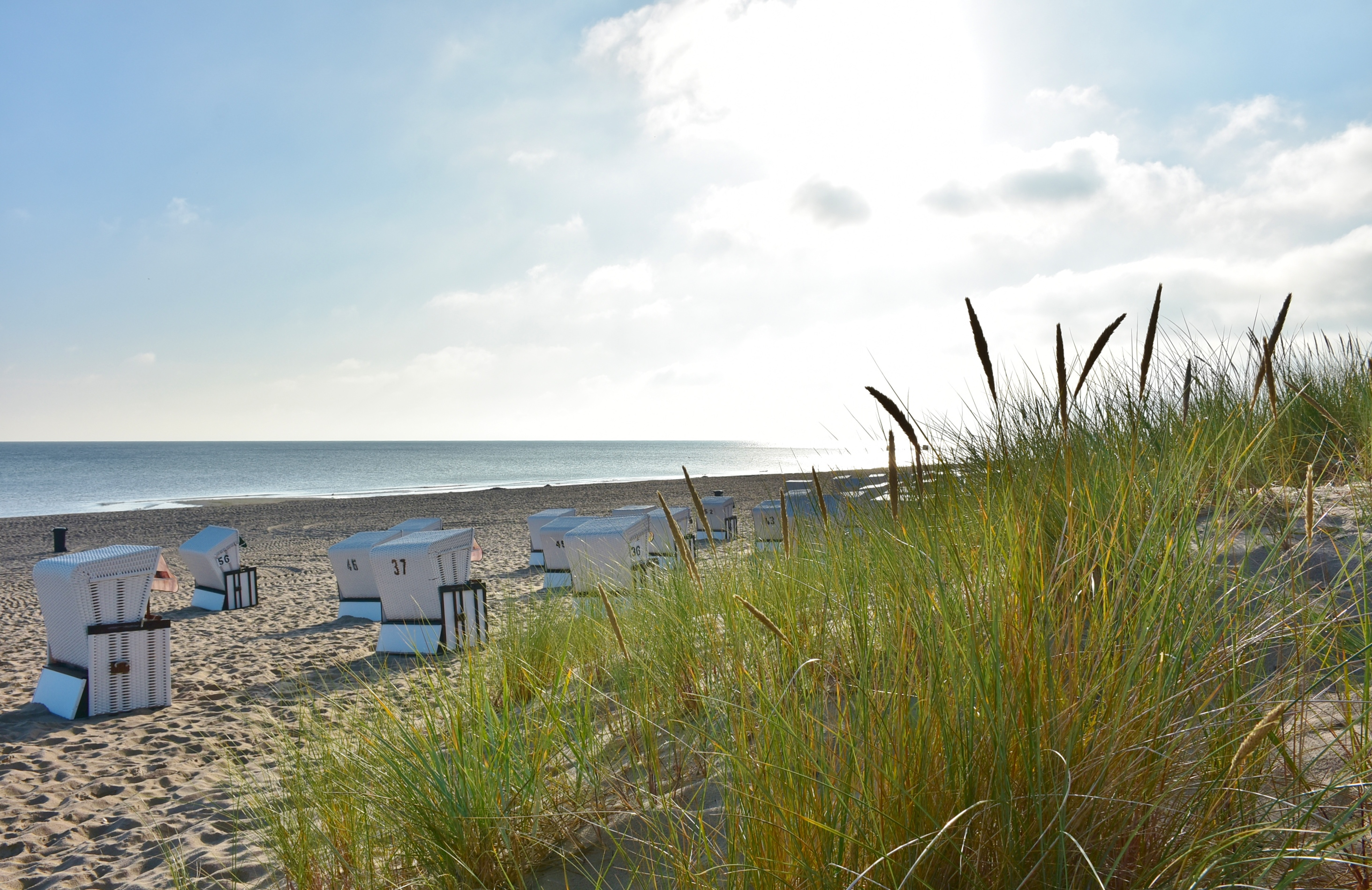 Strand im Ostseebad Trassenheide am Morgen.